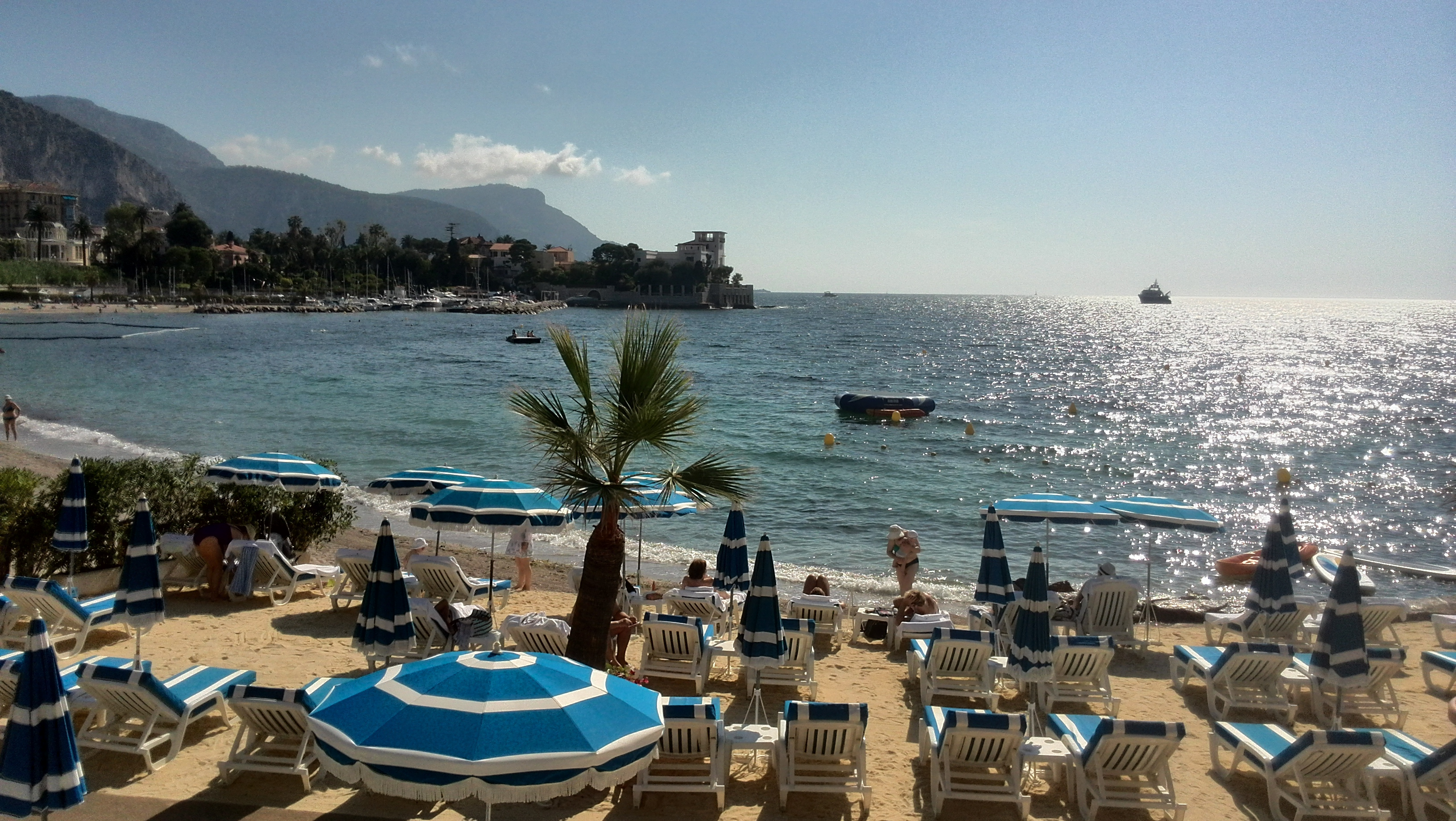 Baie des fourmis (et la Villa Kerylos), Beaulieu sur Mer, France